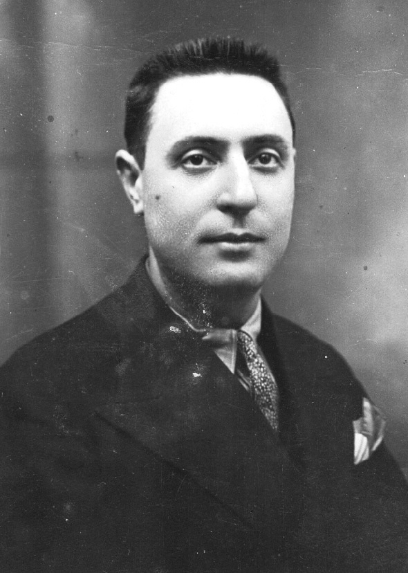 Manuel Maroño Calvo, 1899-1936